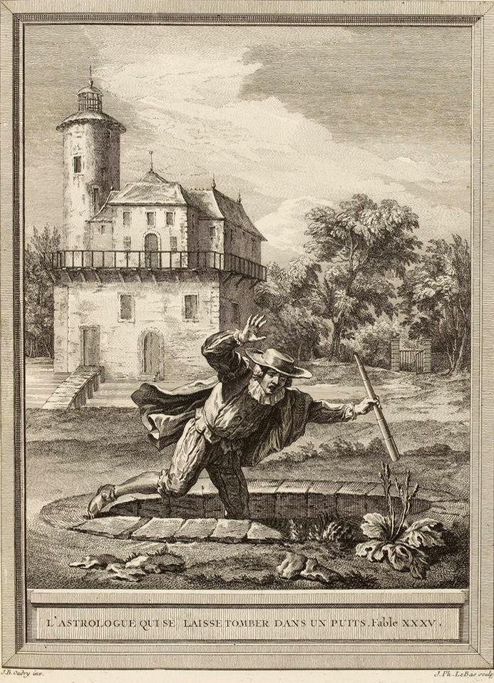 Gravure réalisée par Jacques-Philippe Le Bas d'après un dessin de Jean-Baptiste Oudry représentant la fable L'astrologue qui se laisse tomber dans un puits de Jean de La Fontaine (fable 13 du livre II). Cette gravure est parue dans l'édition complète des fables de La Fontaine, parue en quatre tomes chez l'éditeur Desaint & Saillant, rue saint Jean de Beauvais à Paris, 1755-1759.